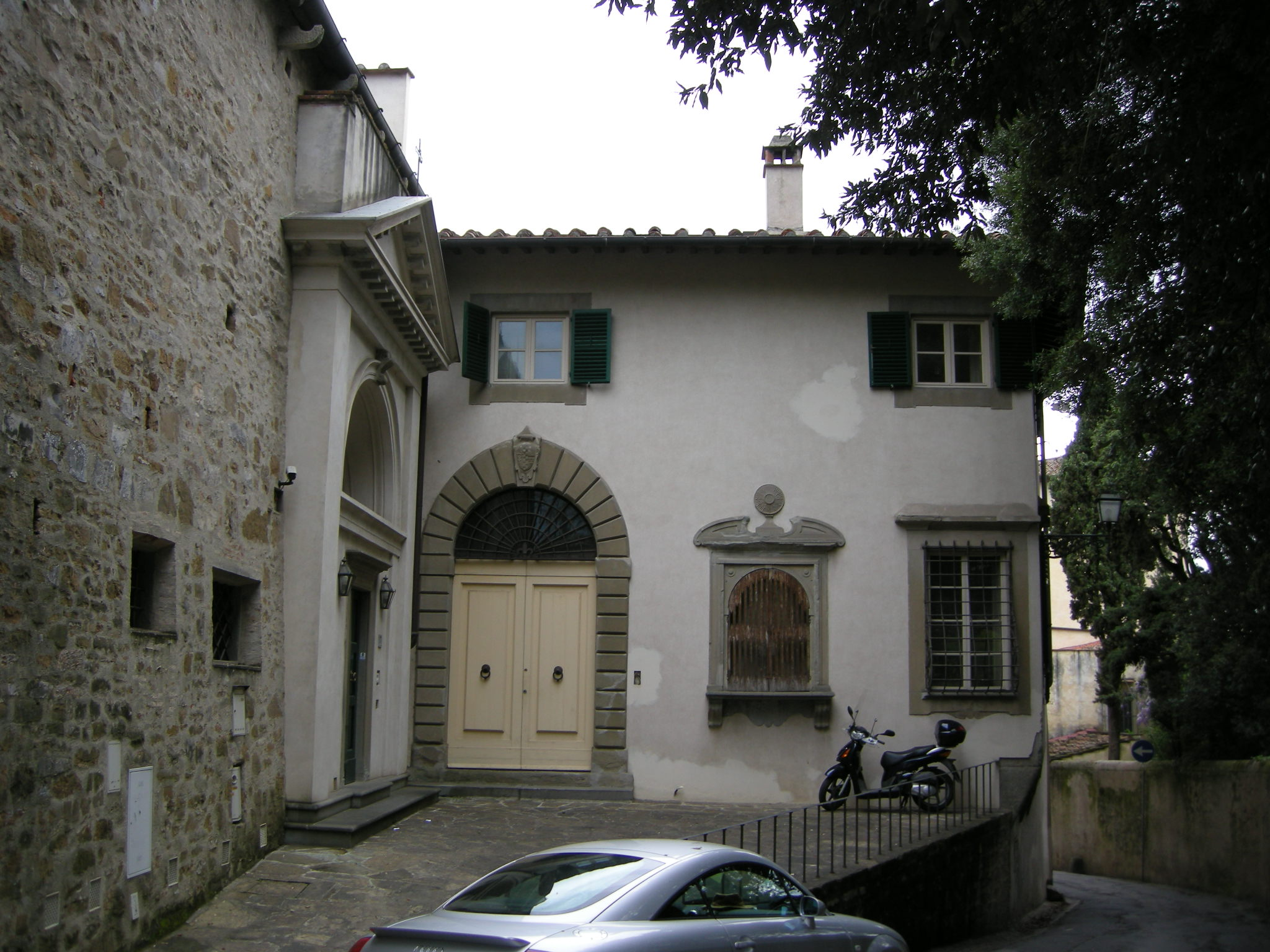 Villa il giullarino